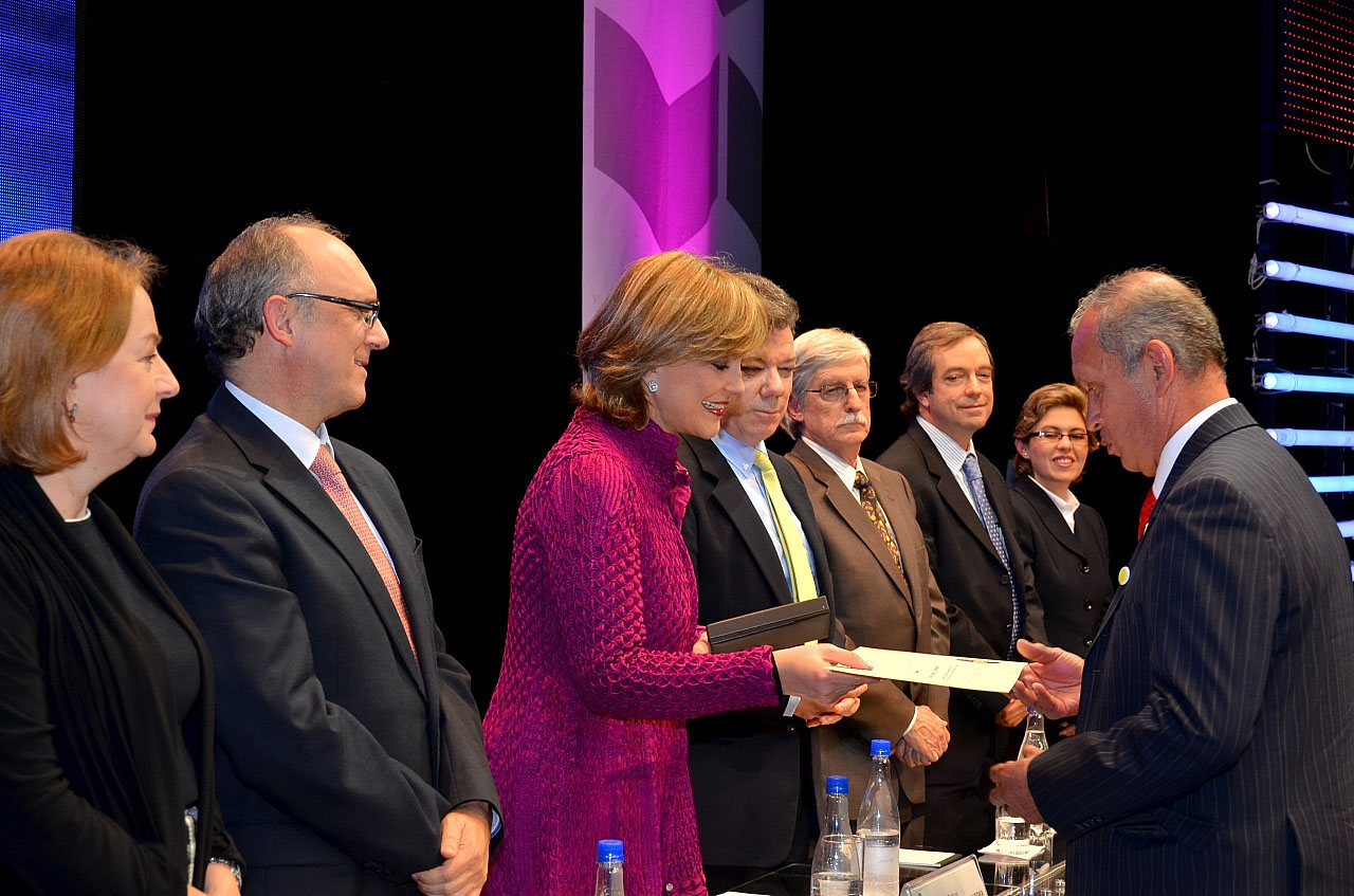 El rector de la Escuela Tecnológica-Instituto Técnico Central La Salle, Hno. Isidro Daniel Cruz, recibe de manos de la ministra de educación nacional, María Fernanda Campo, el Premio a la Calidad Educativa 2011